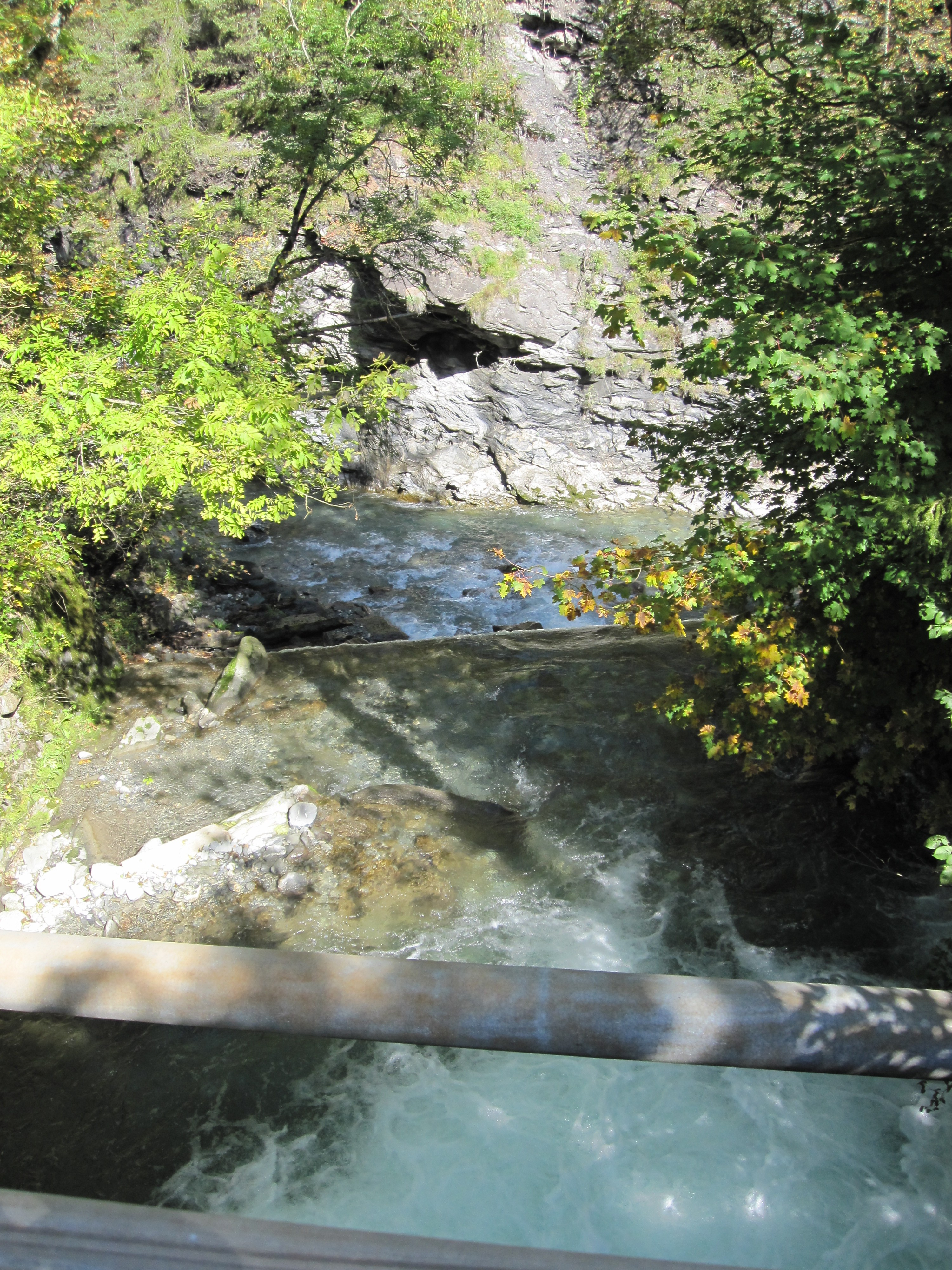 Einmündung der Rabiosa in die Plessur bei Meiersboden (bei Chur, Kanton Graubünden; politisch zu Churwalden gehörig)